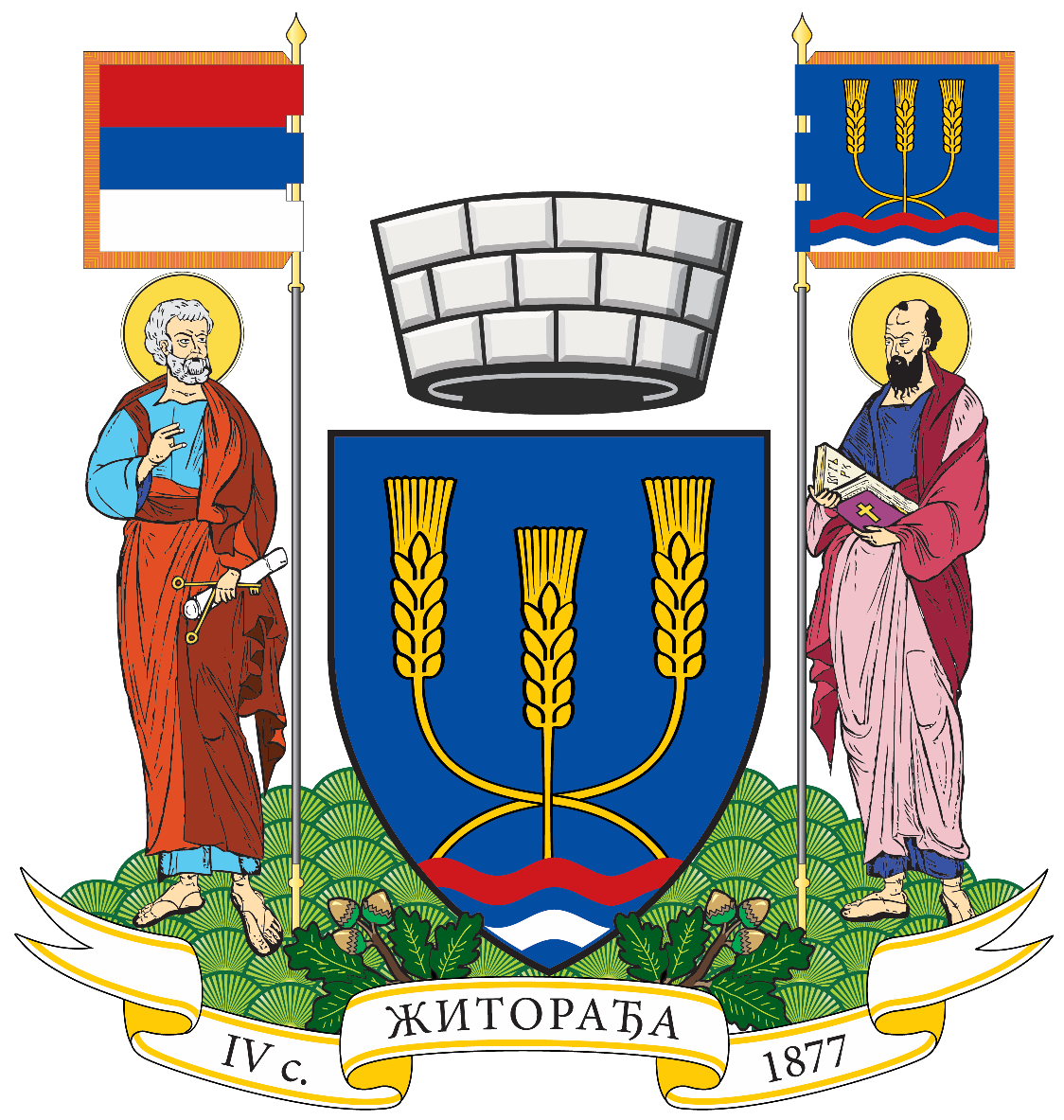 Велики грб - грб највишег ранга, репрезентује општину у посебним и другим утврђеним случајевима и на за то одређеним местима. У средини је основни грб (мали грб) општине Житорађа, који представља штит. Изнад штита се налази сребрна бедемска круна без видљивих мерлона (зуба) који представљају територијалну ознаку која хералдички говори да се ради о територији са око 20.000 становника. Као држачи штита појављује се на хералдички десној страни (левој од стране посматрача) Свети апостол Петар, а са леве Свети апостол Павле, као директна асоцијација на општинску славу. Ту су и стегови - хералдичке заставе, и то стег Републике Србије као надређене територијалне инстанце - хералдички десно, и историјски стег - хералдички лево. Стег лево је квадратан, и на њему се налази застава Општине Житорађа. Травом обрасли брежуљкасти постамент и у дну штита симетрично постављене храстове гранчице, симболишу равничарско – брдовити терен наше општине. Цела композиција великог грба стоји на ленти у чијем централном делу је исписан назив општине, лево је исписано римским словима „IV c“ што означава 4. век, од када датирају први писани подаци о Житорађи. На десном делу ленте је исписана 1877. Година, година ослобођења Житорађе од турака. Трака са именом општине није обавезни елемент грба, али лепо заокружују његову визуелну форму и завршава ову хералдичку причу о грбу општине Житорађа. Графичко решење знамења Општине Житорађа урадио је Иван Сарајчић, по замисли радника Општинске управе општине Житорађа Љубише Стевановића из Житорађе. Грб је званично усвојен на седници Скупштине општине Житорађа, дана 15.10.2010. године. Употреба је регулисана Одлуком о употреби имена, грба и заставе општине Житорађа.